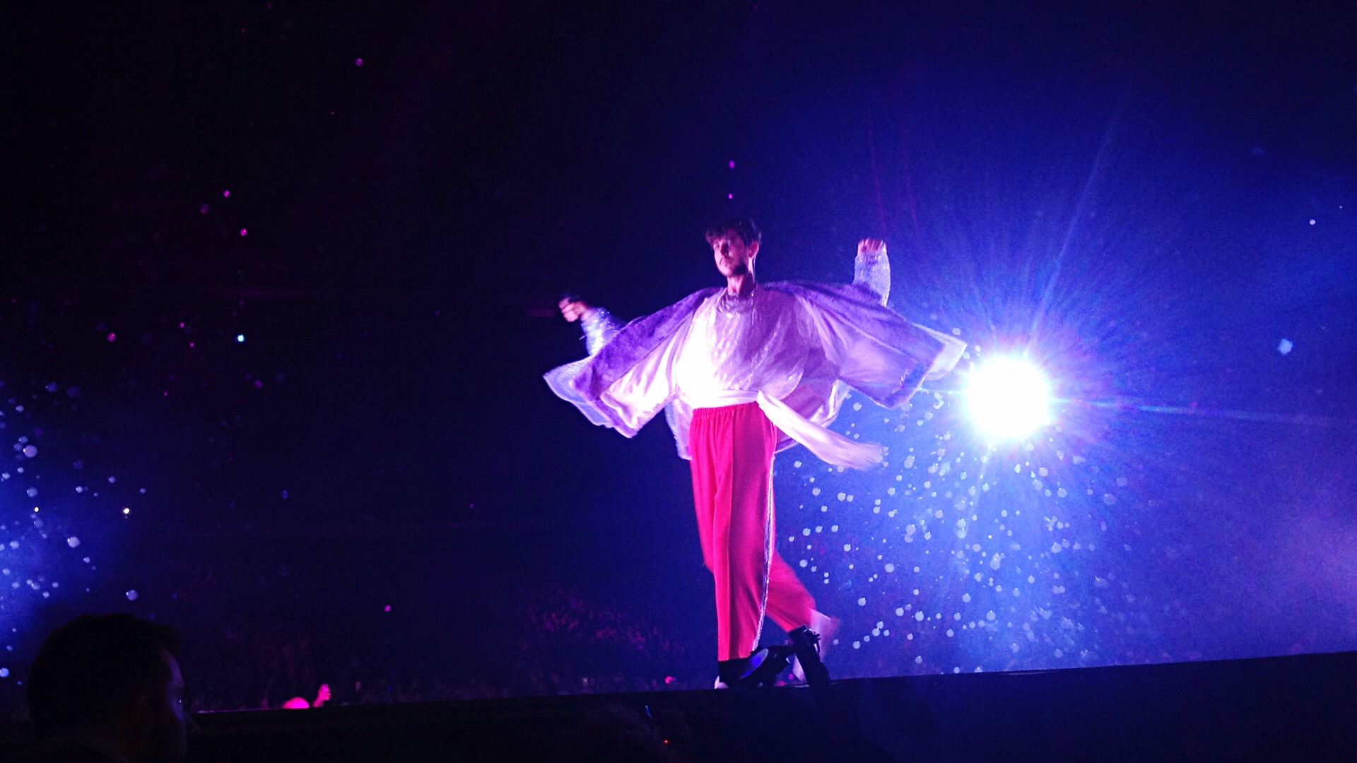 Max Colombie